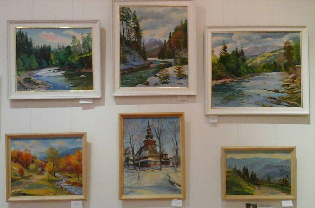 виставка київ